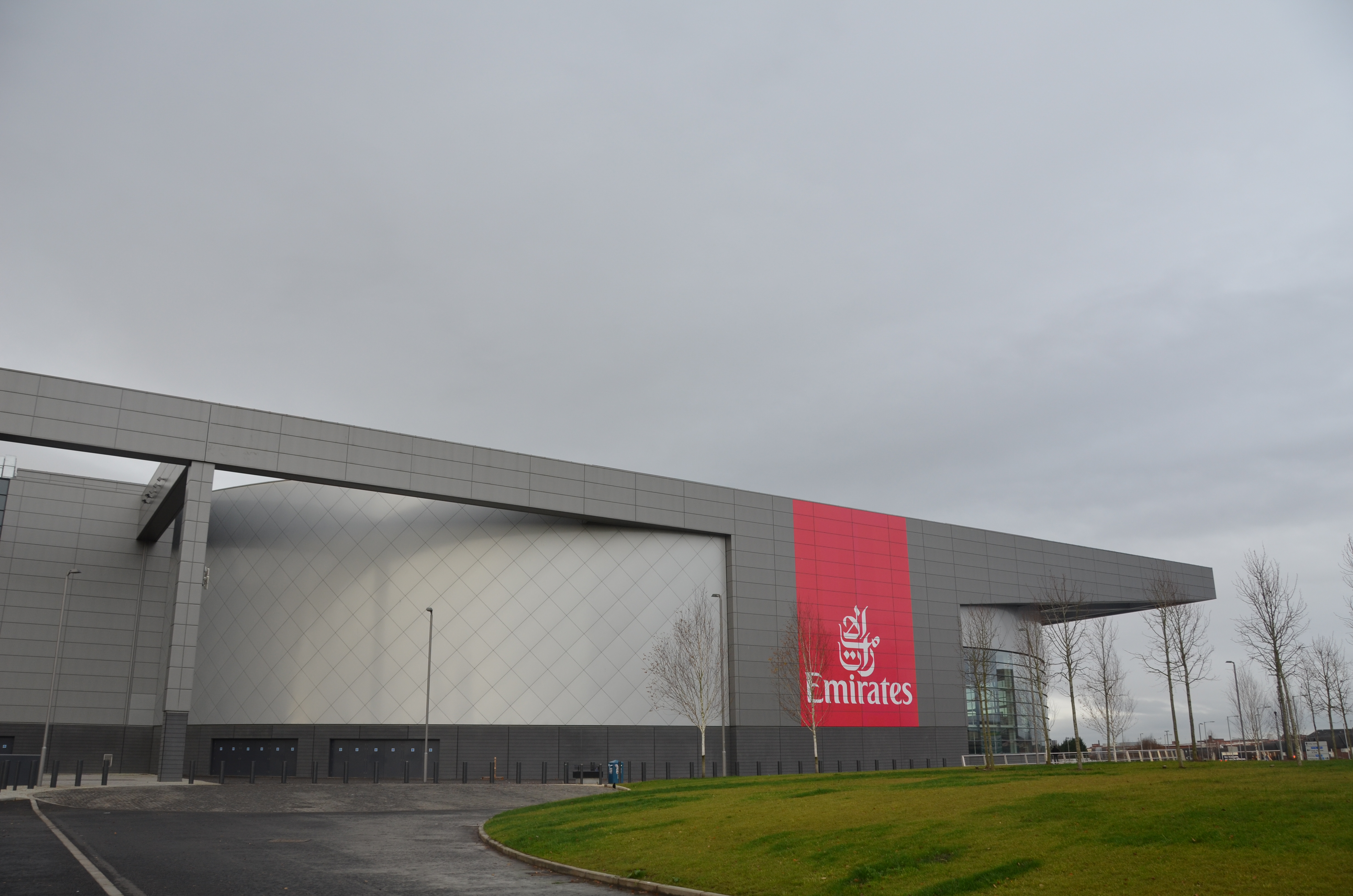 Sir Chris Hoy Velodrome, Bahnrad-Weltcup 2012